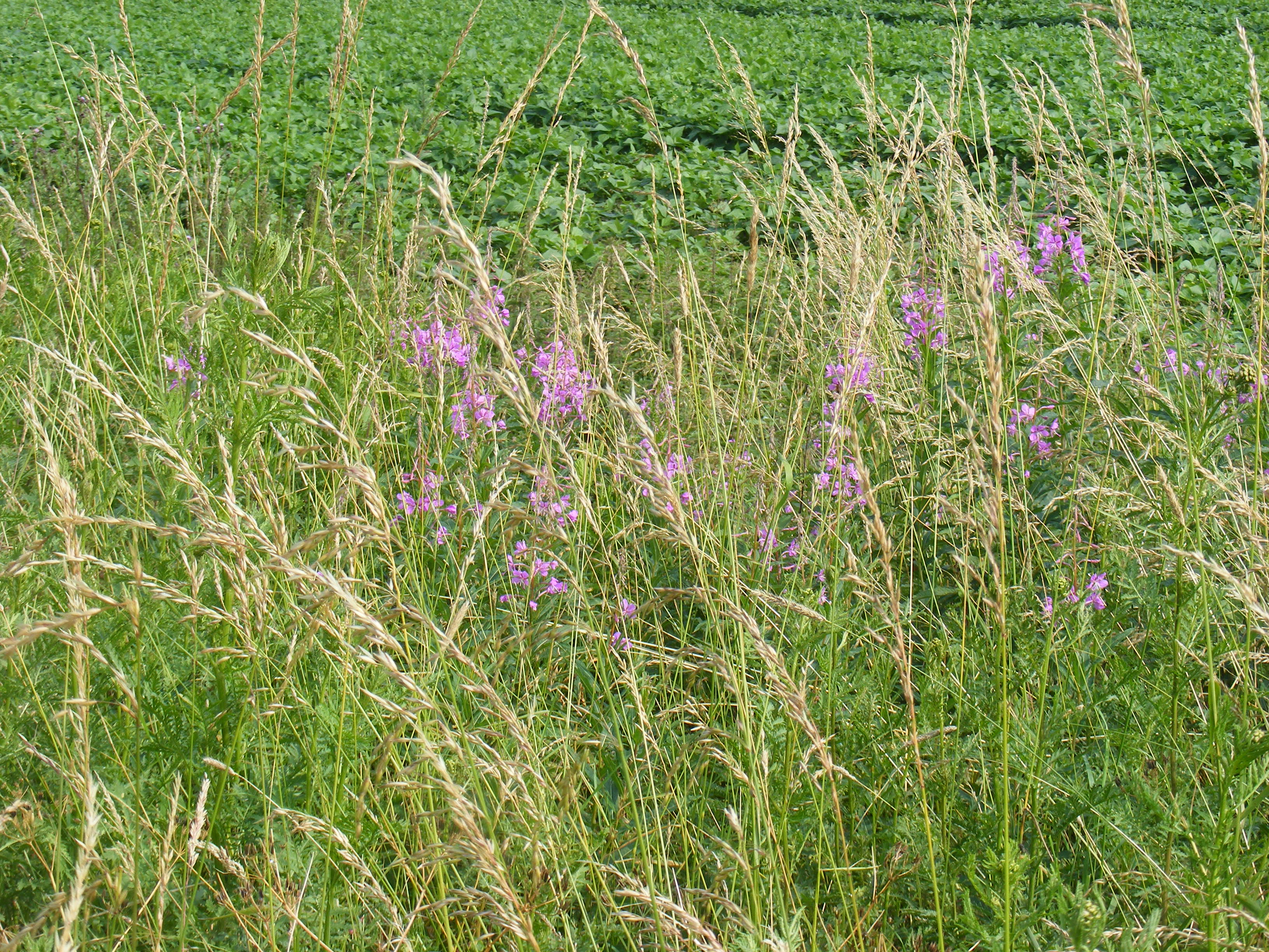 Natuurdoeltype uit de natuurdoeltypetypologie